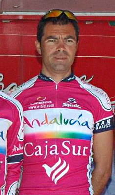 Juan Olmo. Andalucía-Cajasur, Euskal Bizikleta 2008